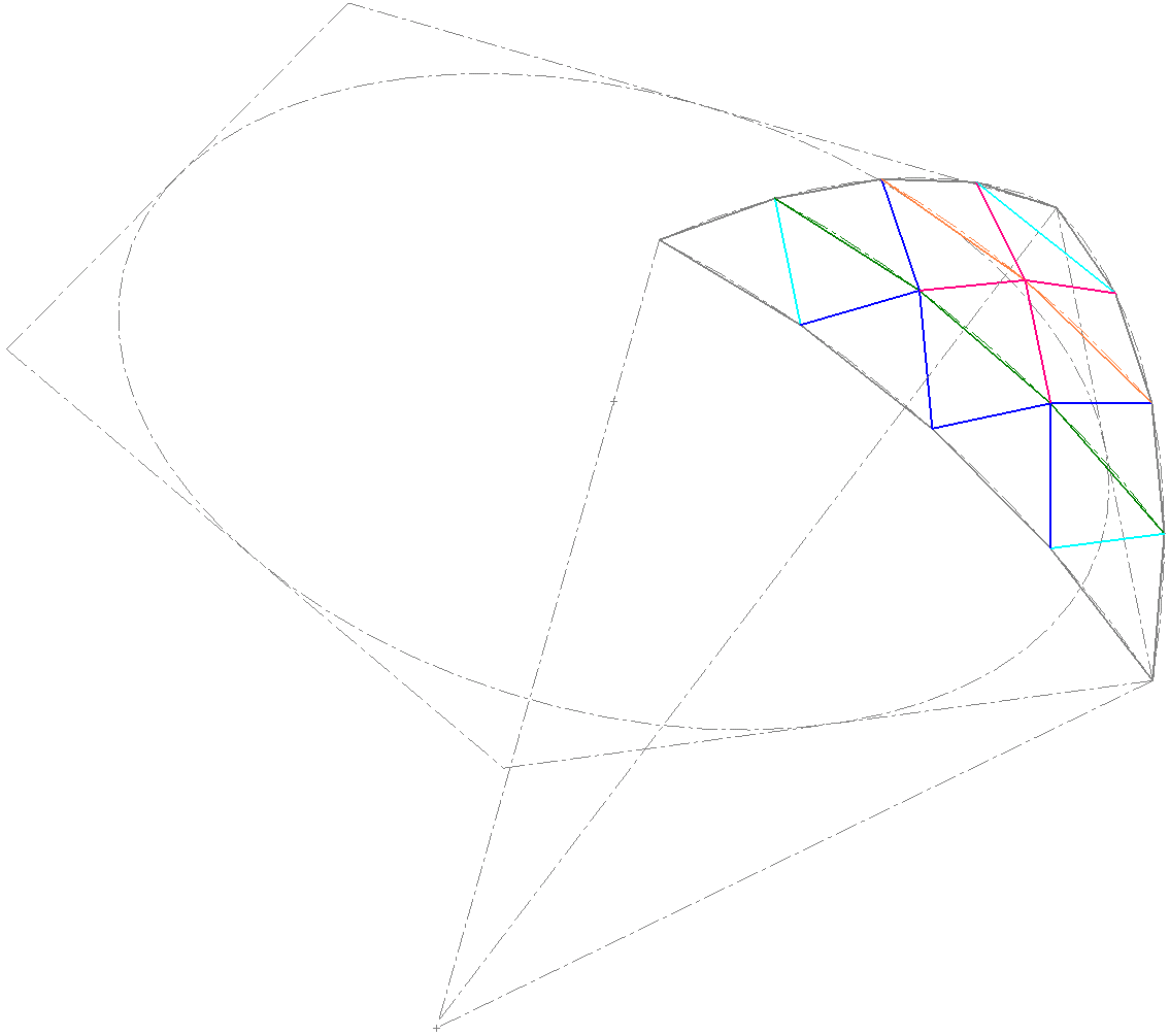 Se ve una cara pentagonal, y un triángulo seperado y levantado a la superficie de la esfera que pasaro por los vértices del Dodecaedro. Líneas conectan los vertices del triángulo al centro. Se divide la sección del círculo entre cada vertice del triangulo en subdivisiones iguales para siempre encontrar los tres vertices de triángulos más chicos.